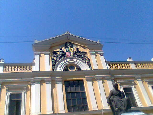 Imagen del terremoto en santiago de chile, Daños producidos en edificios de la Av. Libertador Bernardo O´higgins